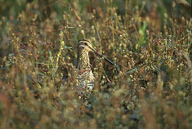 Gallinago gallinago